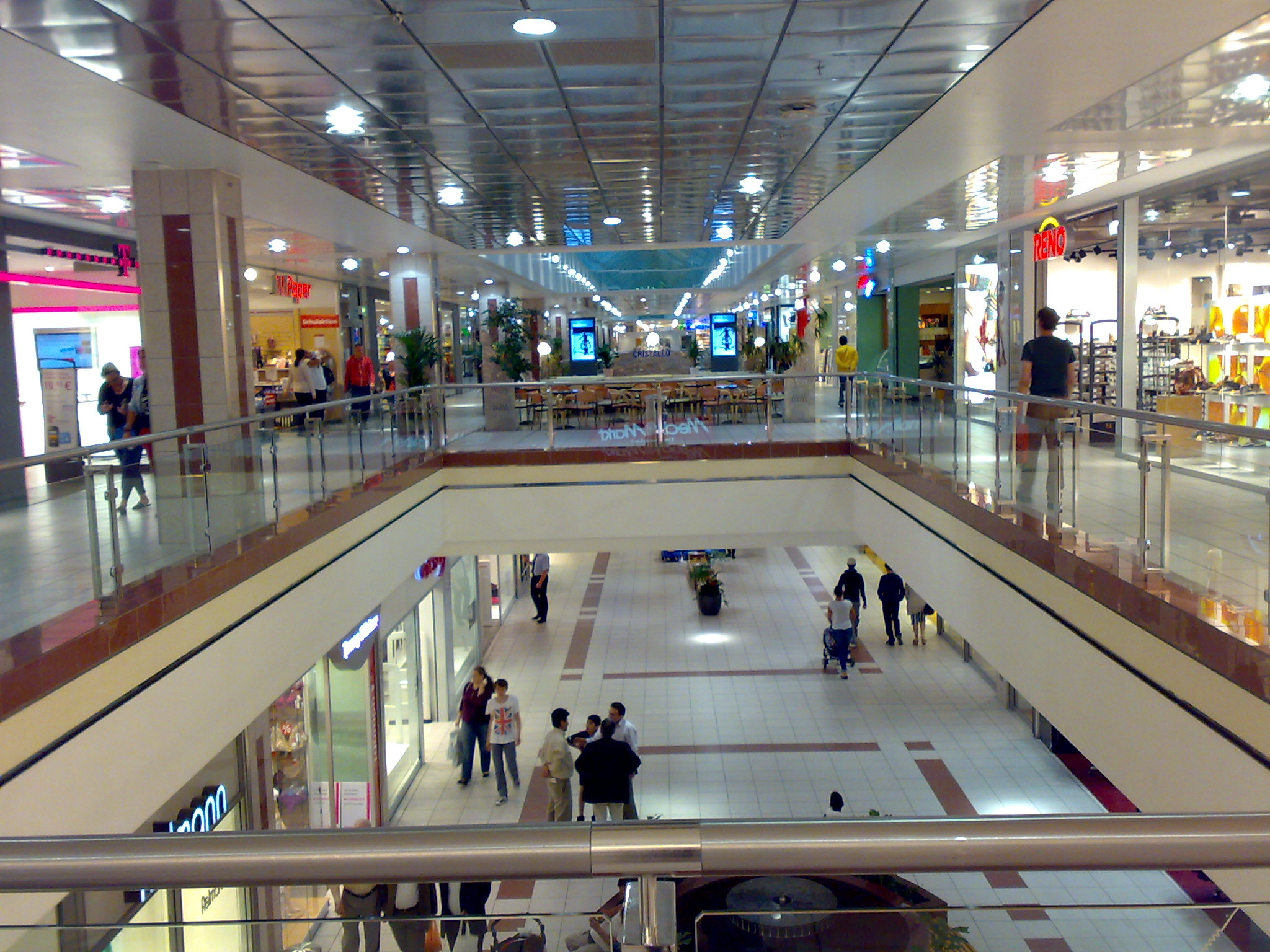 Aufnahme von der Einkaufspassage im Obergeschoss